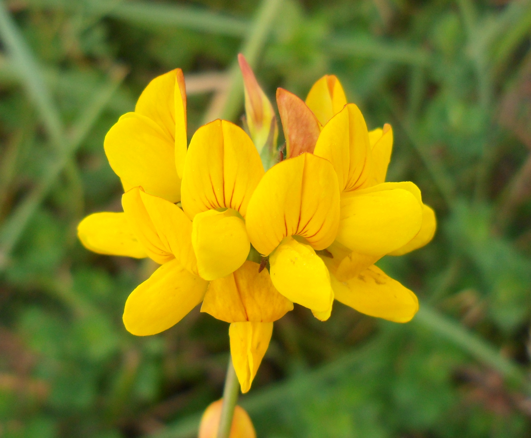 L'inflorescence de L. pedunculatus est une ombelle de 6-12 fleurs papillonacées jaunes.